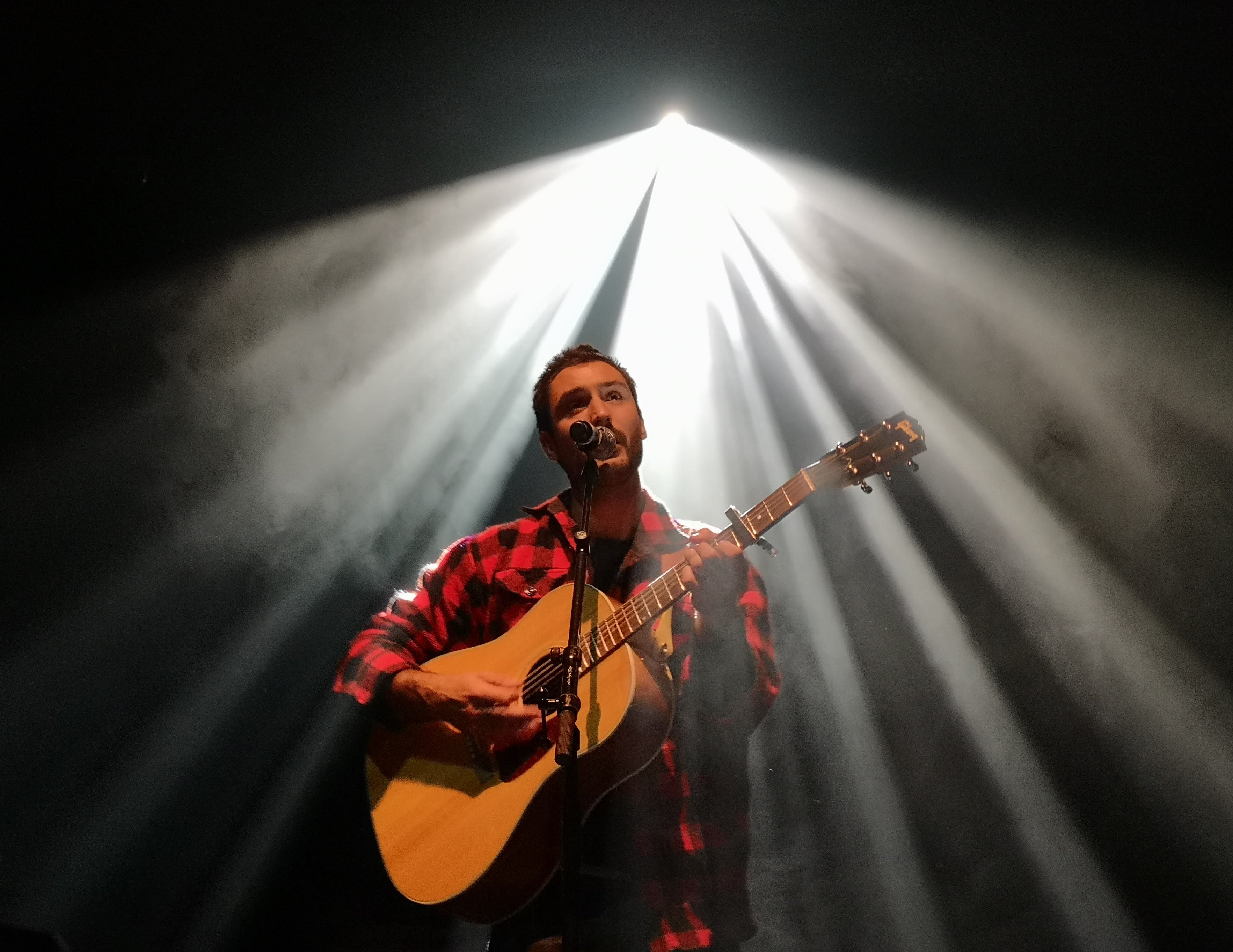 Jérémy Frérot en concert à la Cigale le 30 septembre 2019